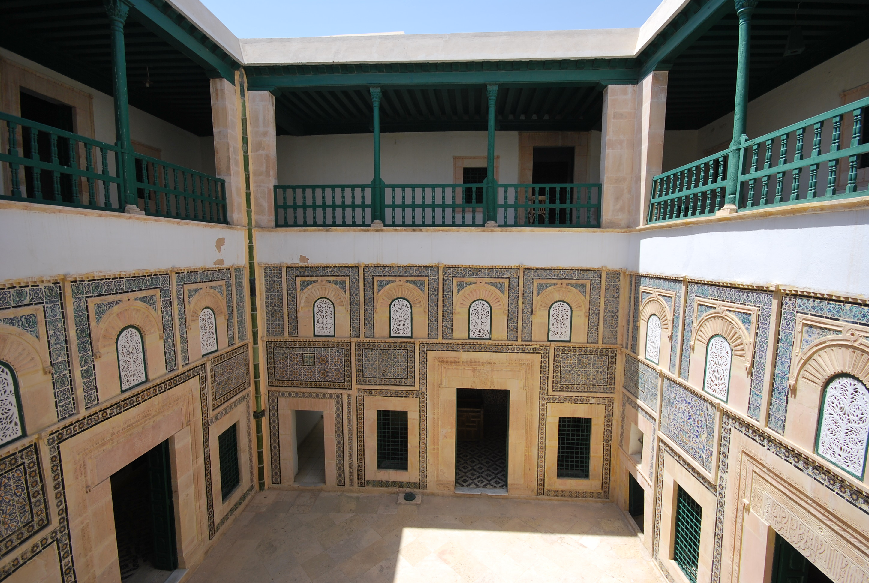 Façade du patio du musée Dar Jallouli à Sfax